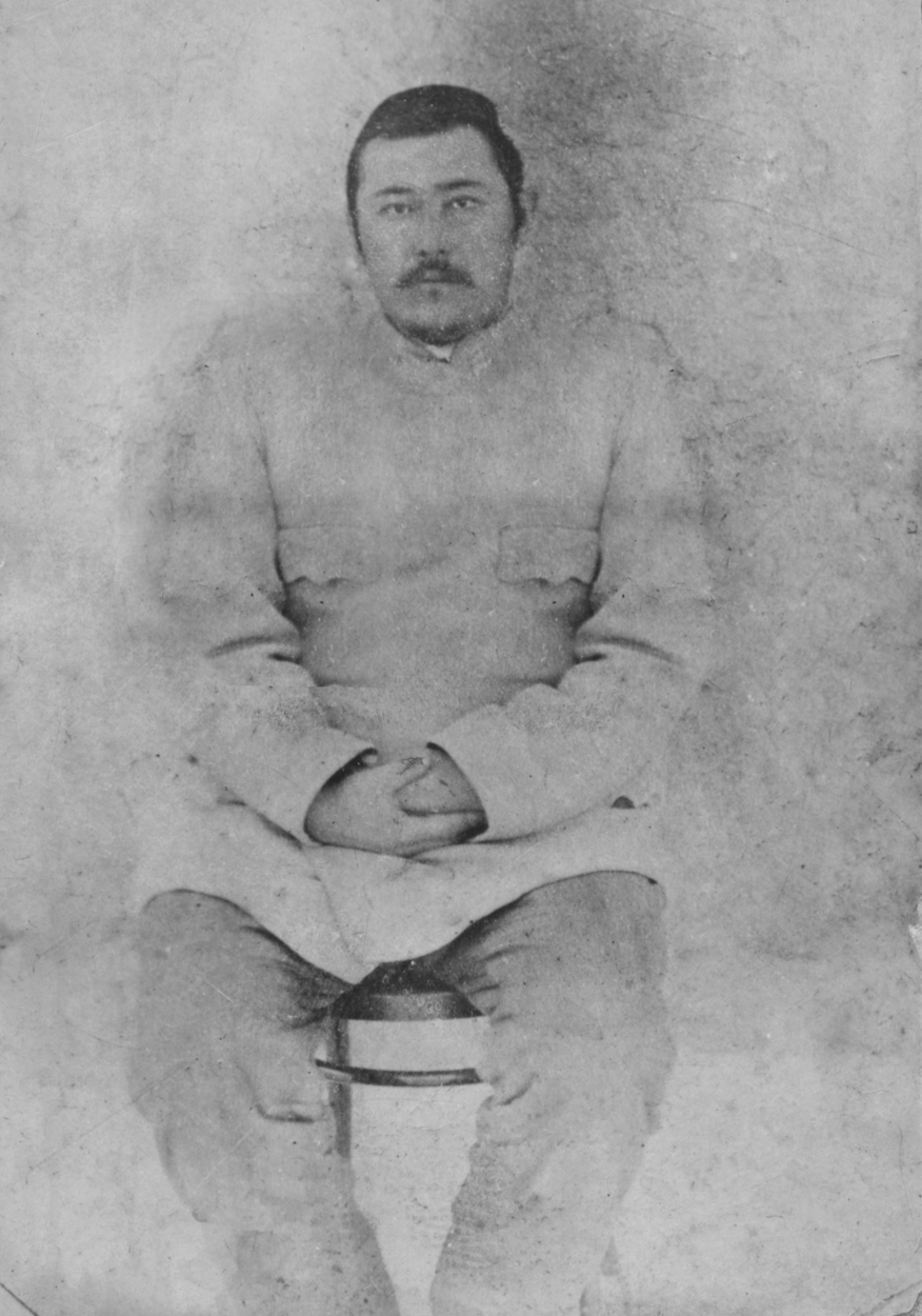 Қазақша (кирил): Қызыр Мамырбекұлы